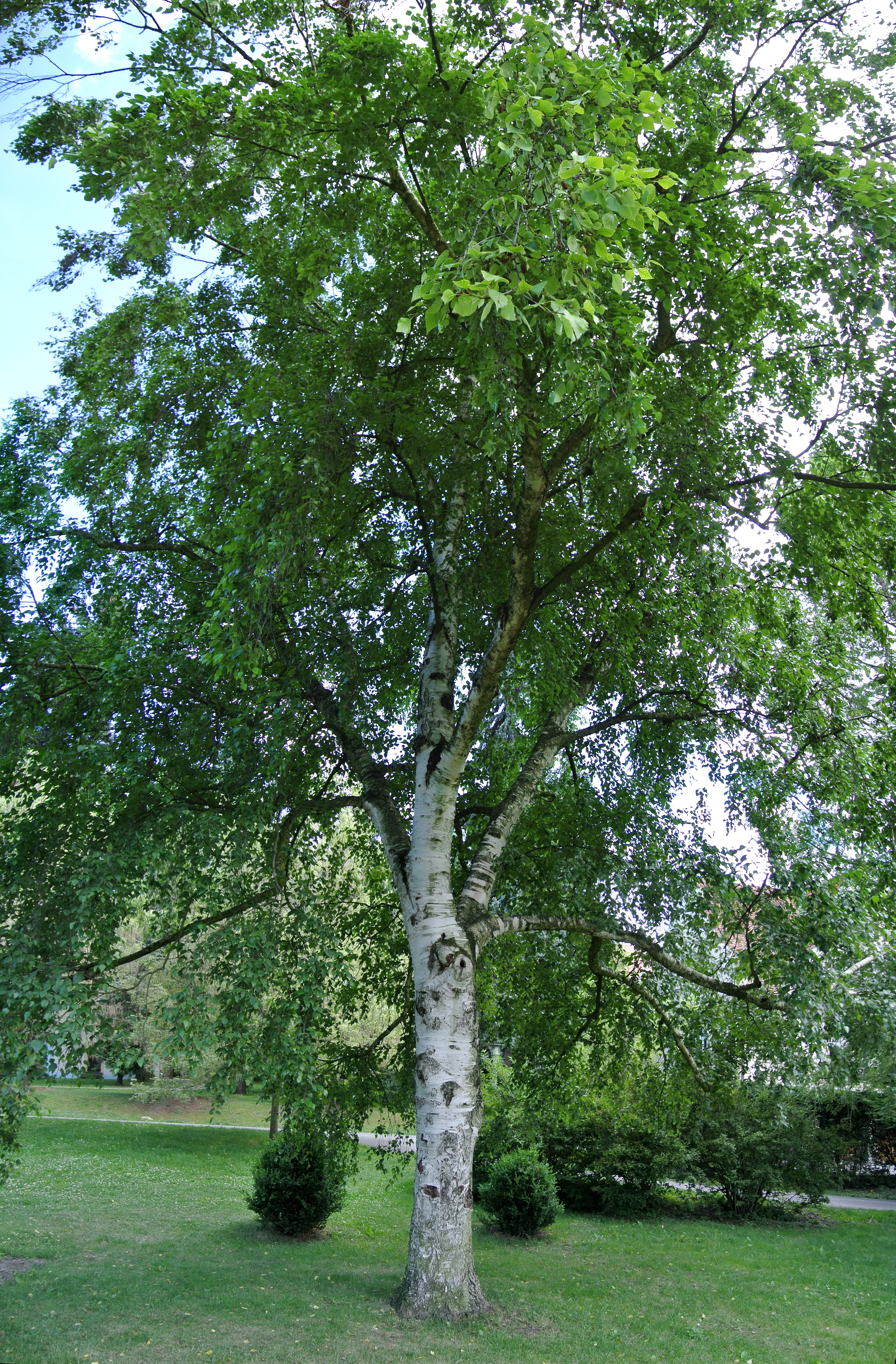 Bříza papírová